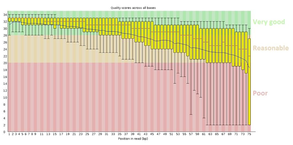 Kokybės kritimas nuskaitytuose fragmentuose.